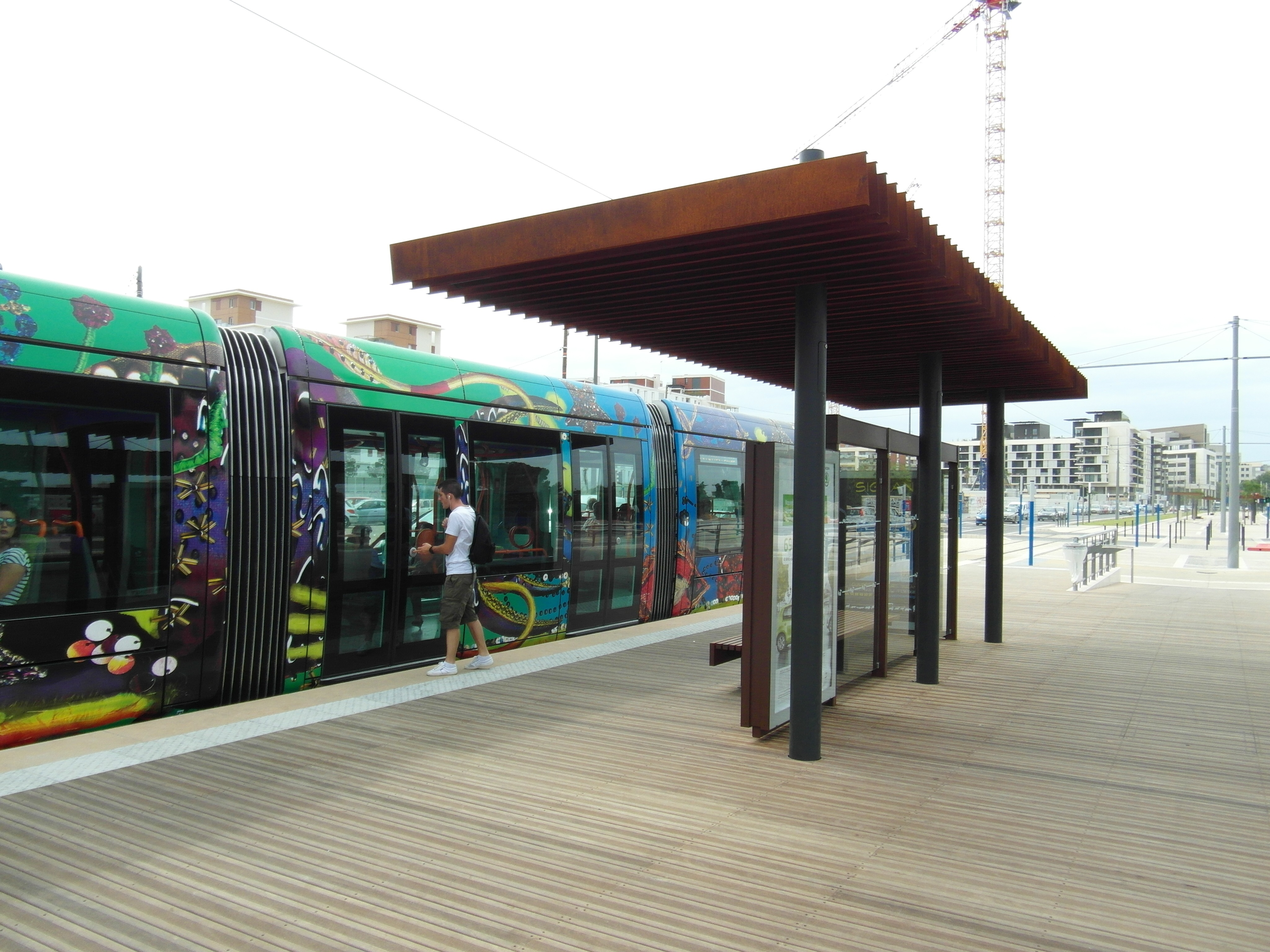 Montpellier - Tramway - Ligne 3 - Centre-Ville - Lattes